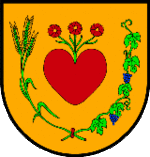 Wappen der Gemeinde Weingraben